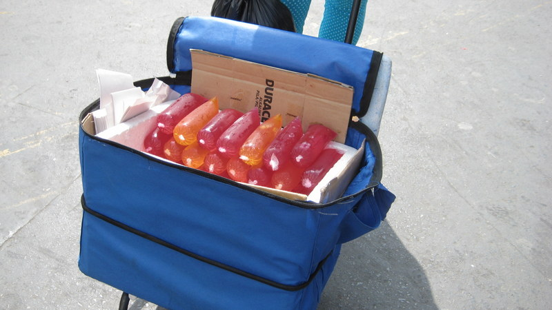 Imágenes de un viaje a Lima en 2013